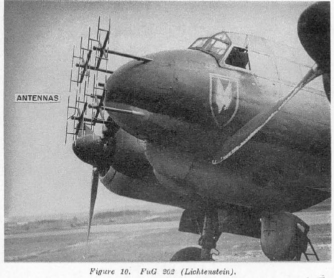 Antennenanlage für Bordradar FuG 202 "Lichtenstein B/C" an einer Junkers Ju 88